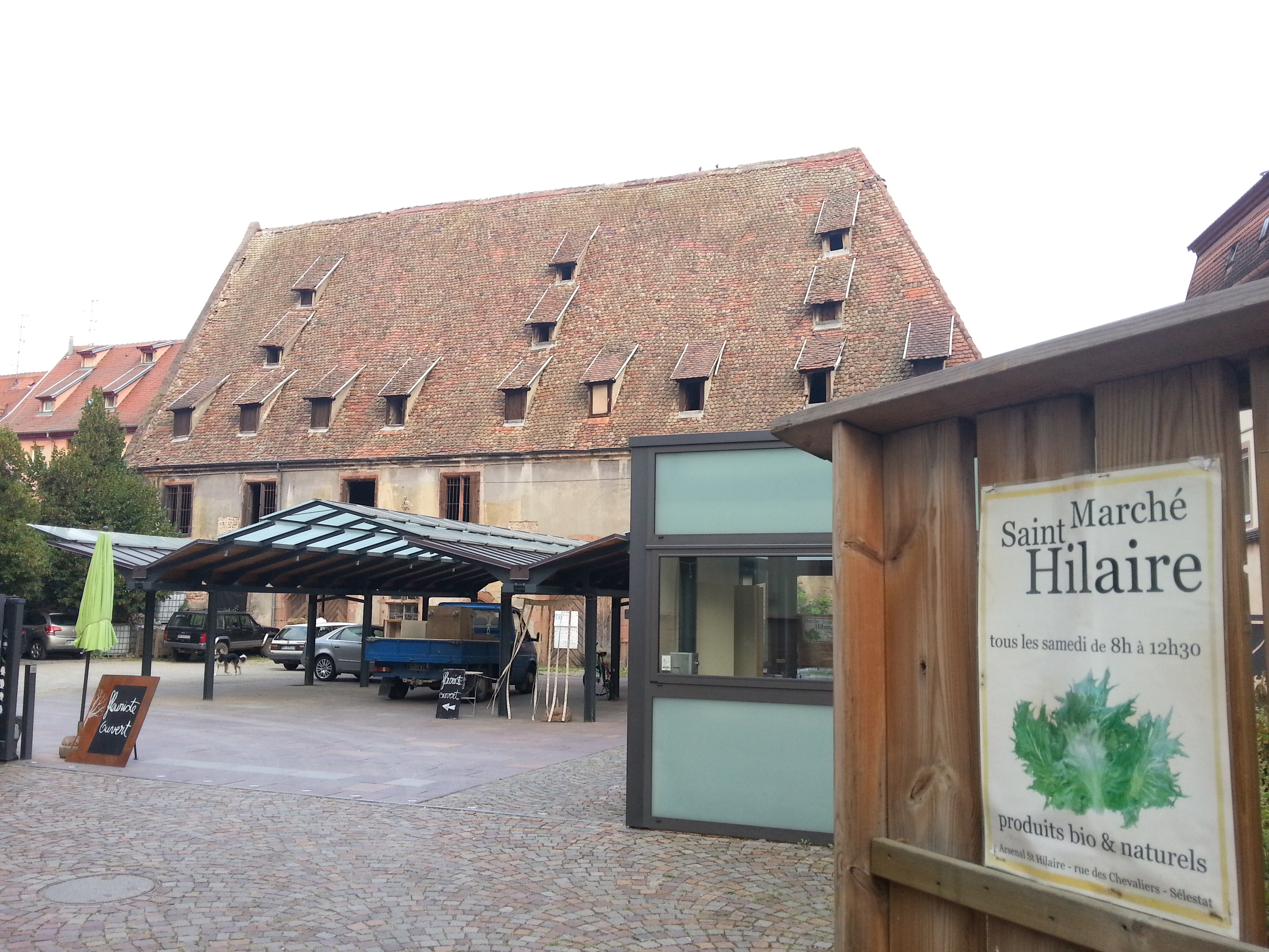 Zeughaus Saint-Hilaire, Schlettstadt, 16. Jahrhundert